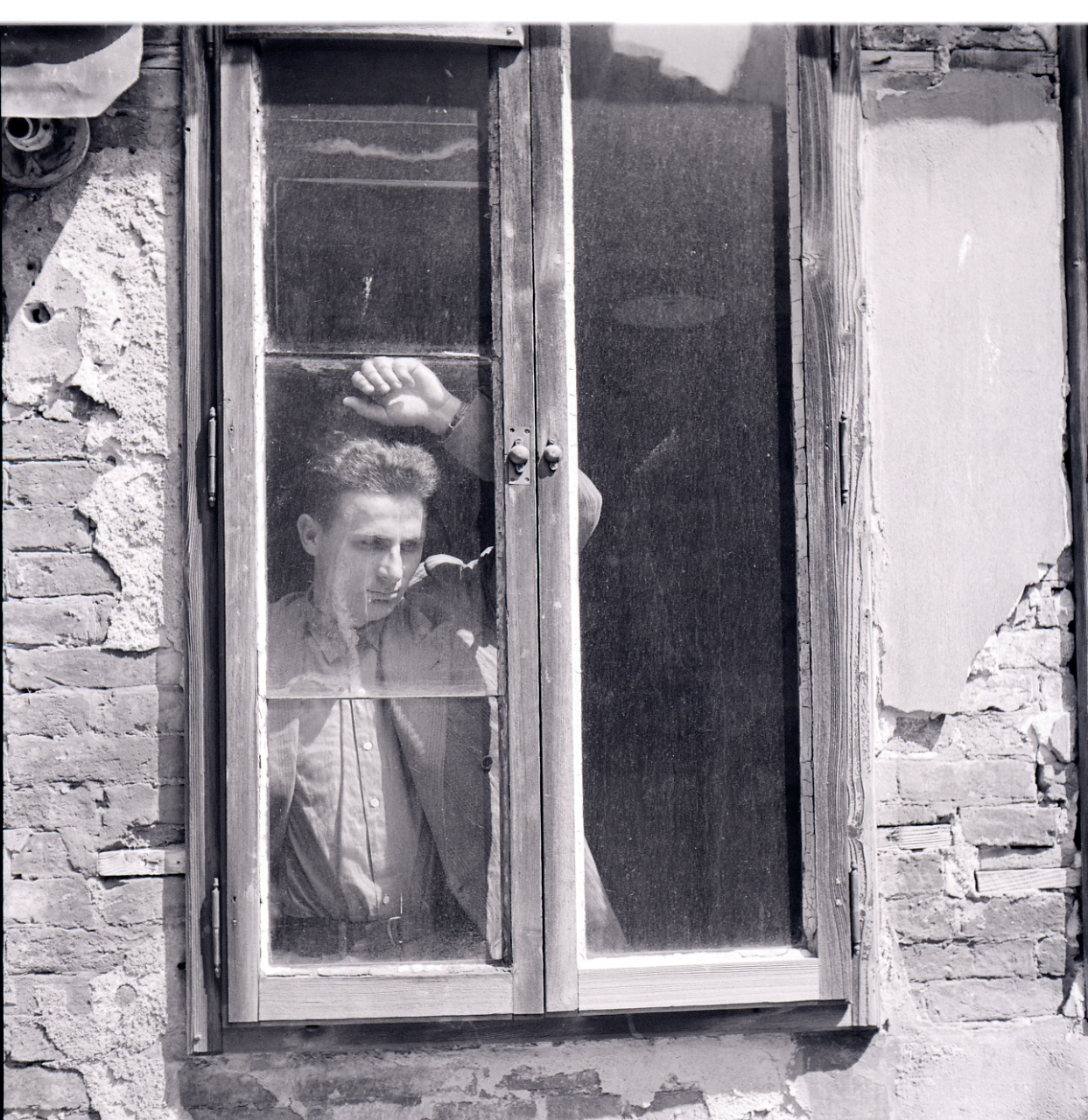 Servizio fotografico : Italia, 1953 / Paolo Monti. - Buste: 5, Fototipi: 5 : Negativo b/n, gelatina bromuro d'argento/ pellicola ; 6x6. - ((Serie costituita da 5 buste di carta, tenute insieme da una graffetta, identificate con i nn.: R4474, R4475, R4476, R4477, R4478 . - Sulla busta R4474: "Roiter". - Venezia?. - Fonte: Quaderno di Paolo Monti: Foto Leica 2 / 111 - 285 (1934-1965), presso Archivio Paolo Monti